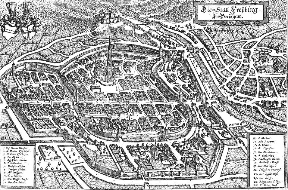 Gesamtansicht von Freiburg. Plan ist geostet